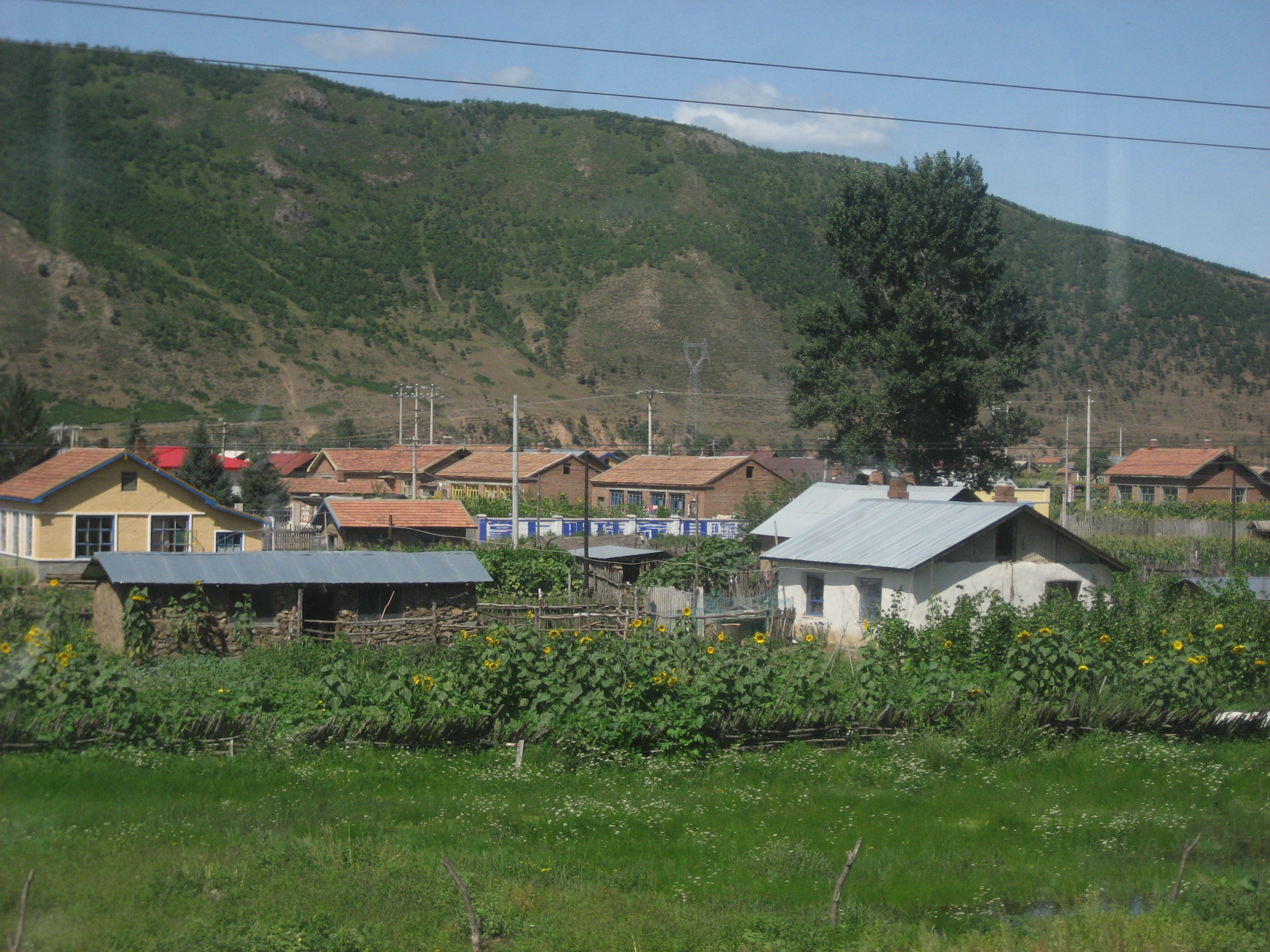 tranquil village